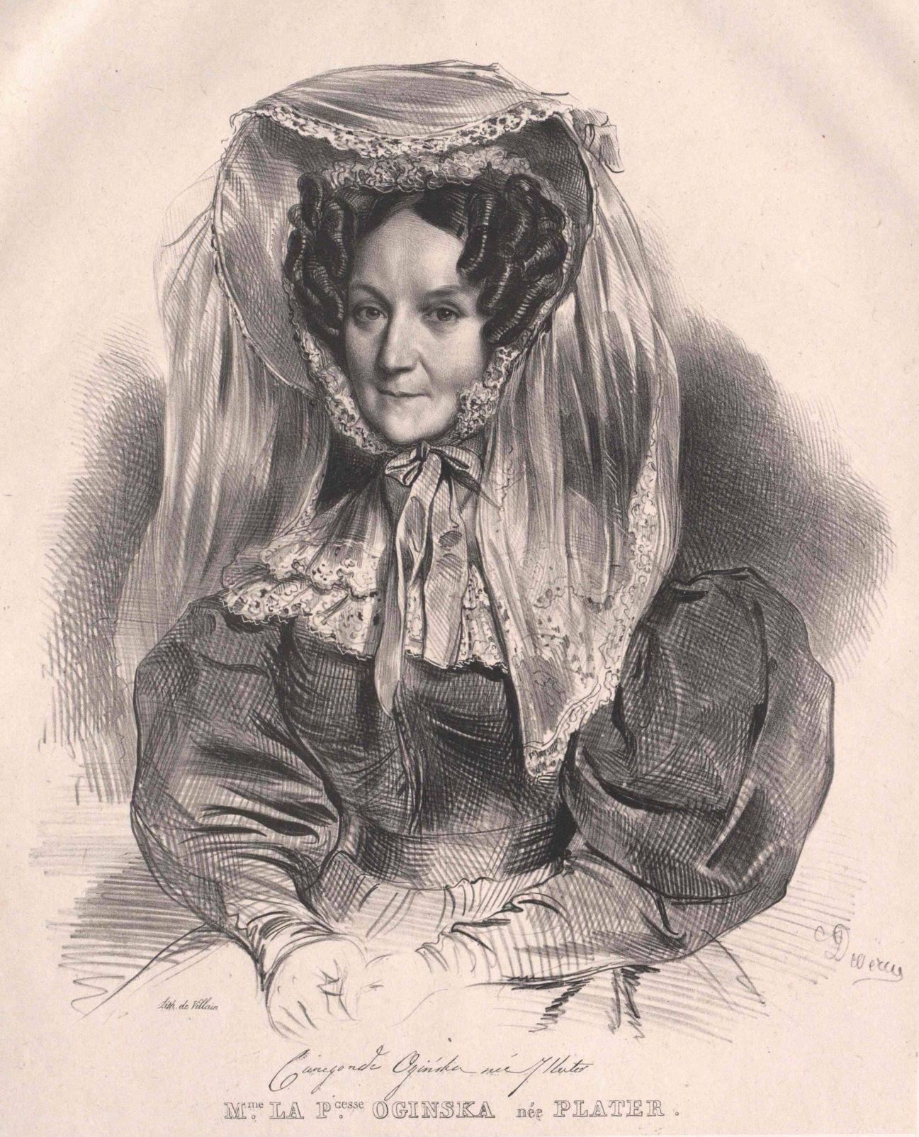 Kunegunda z Platerów Ogińska